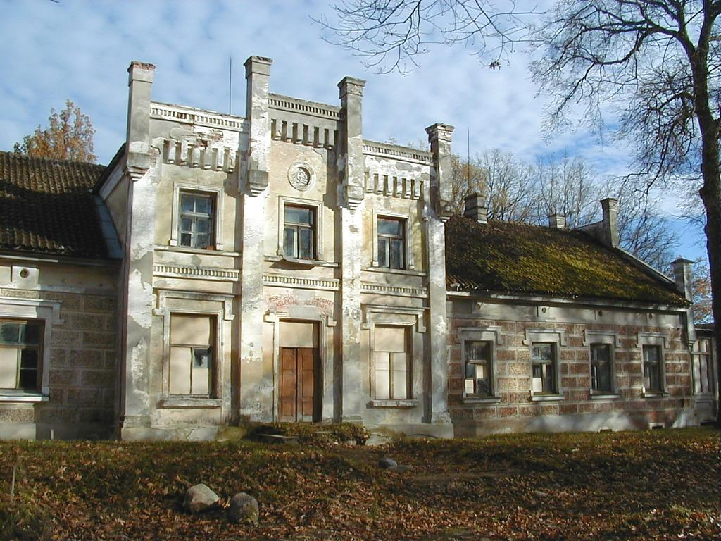 Rūmenes muižas pils 2000-10-28